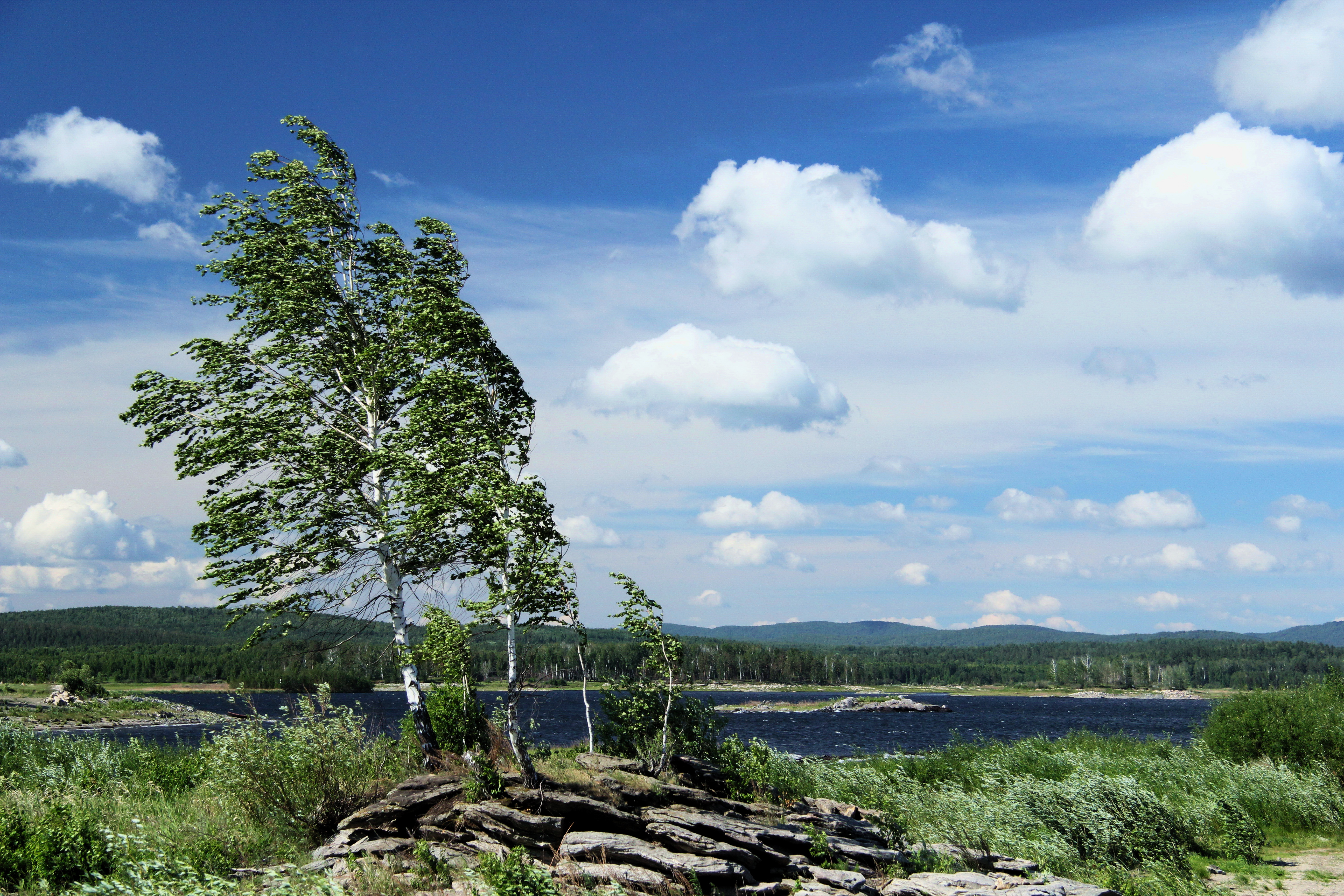 Аргазинское водохранилище, Аргаяшский район This image is related to the protected area of Russia number 7410013